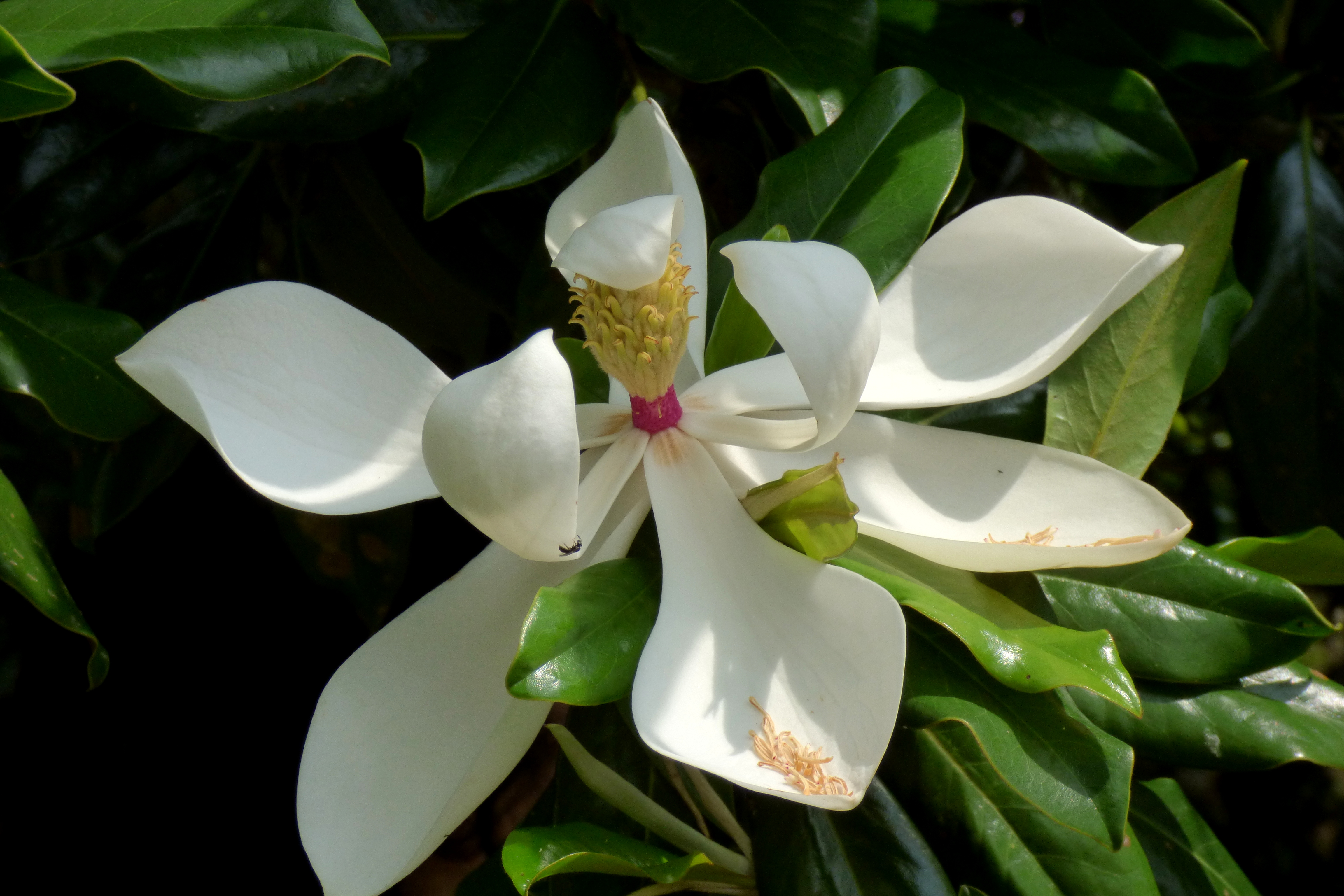 Magnolio (Magnolia grandiflora)